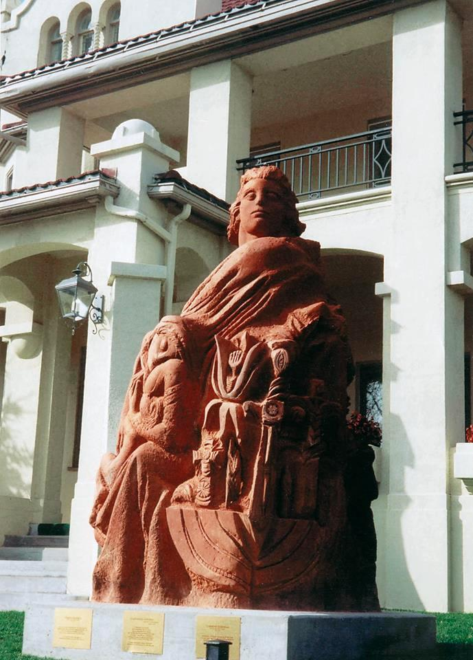 Հավերժական Հայաստան հուշարձանը Կանադայում ՀՀ դեսպանատան շենքի առջև